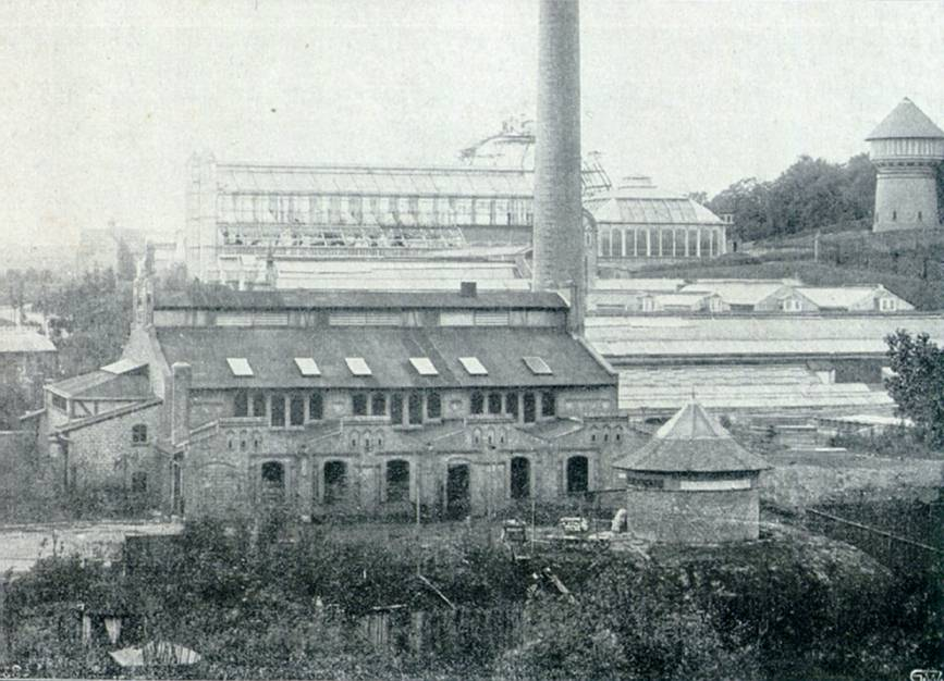 Botanical Garden in Berlin Native nameBotanischer Garten, Berlin-DahlemLocationBerlinCoordinates52° 27′ 18″ N, 13° 18′ 13″ E Established1899Website